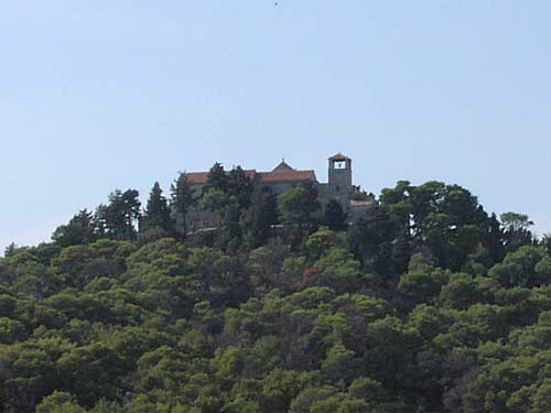 Cokovac